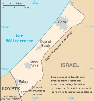 Bande de Gaza : carte en français